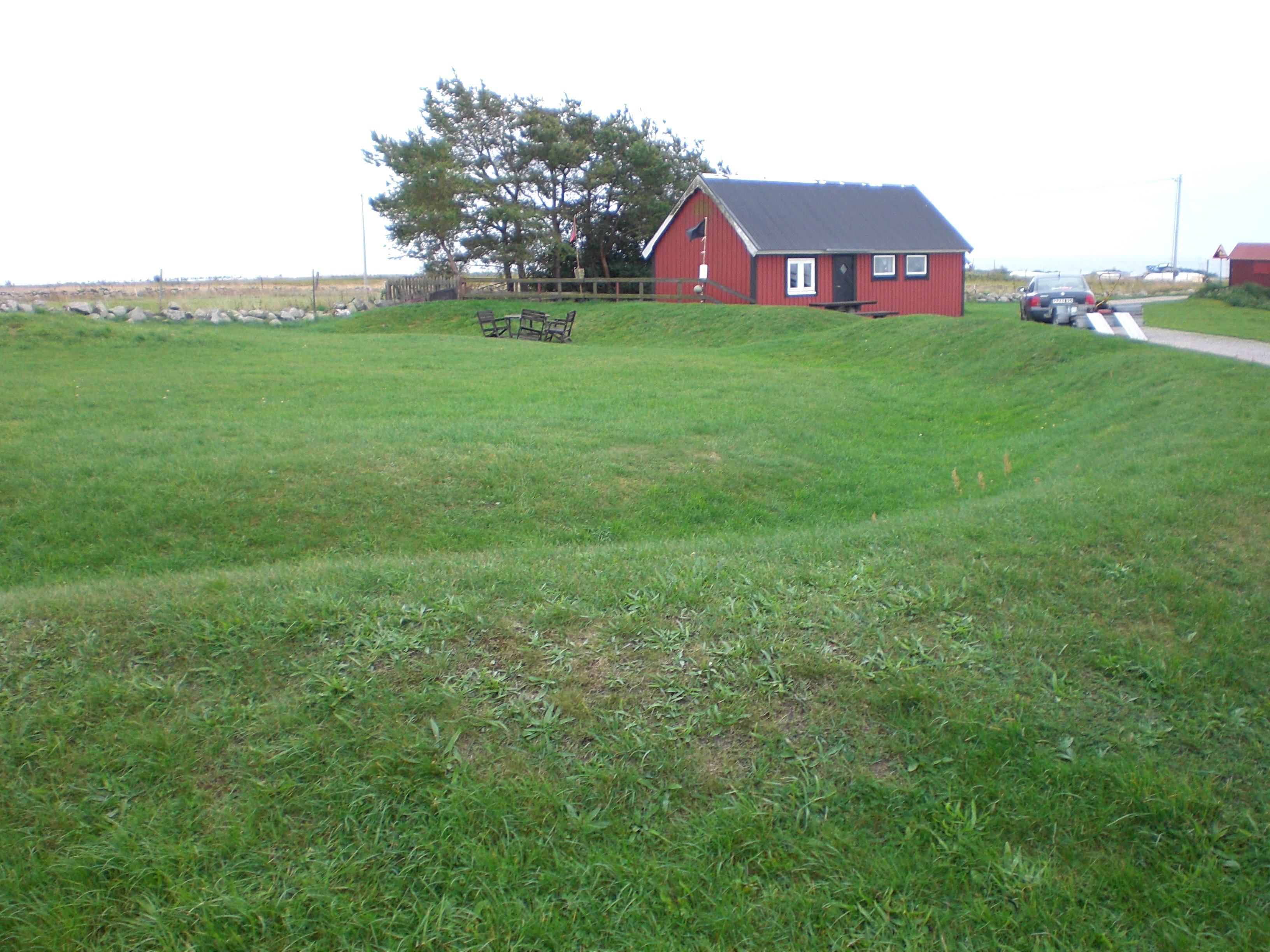 Kapelludden auf Öland, Wälle, vermutlich Reste eines alten Kalkofens